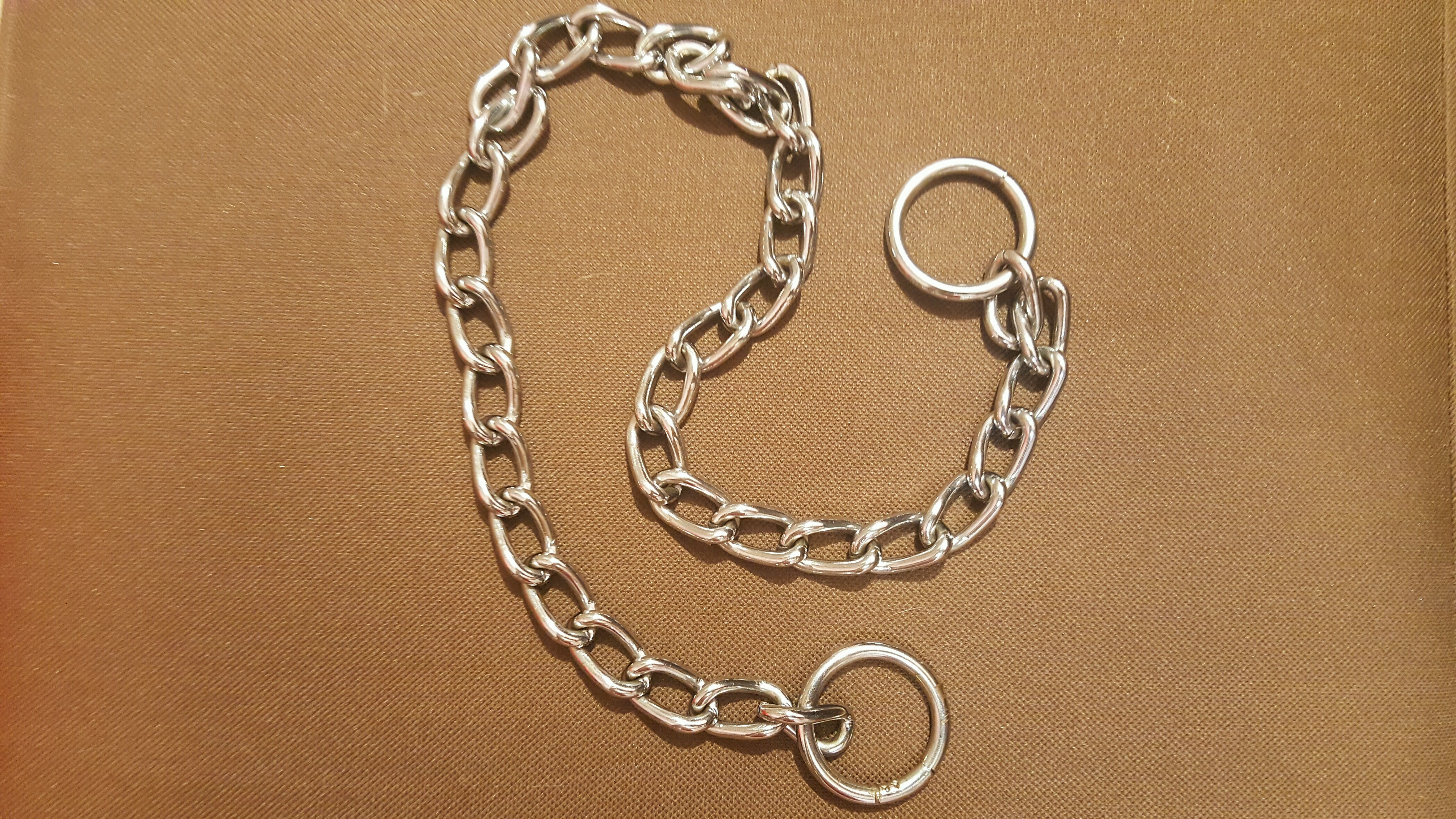 Lühike näituserihm metallist koerale